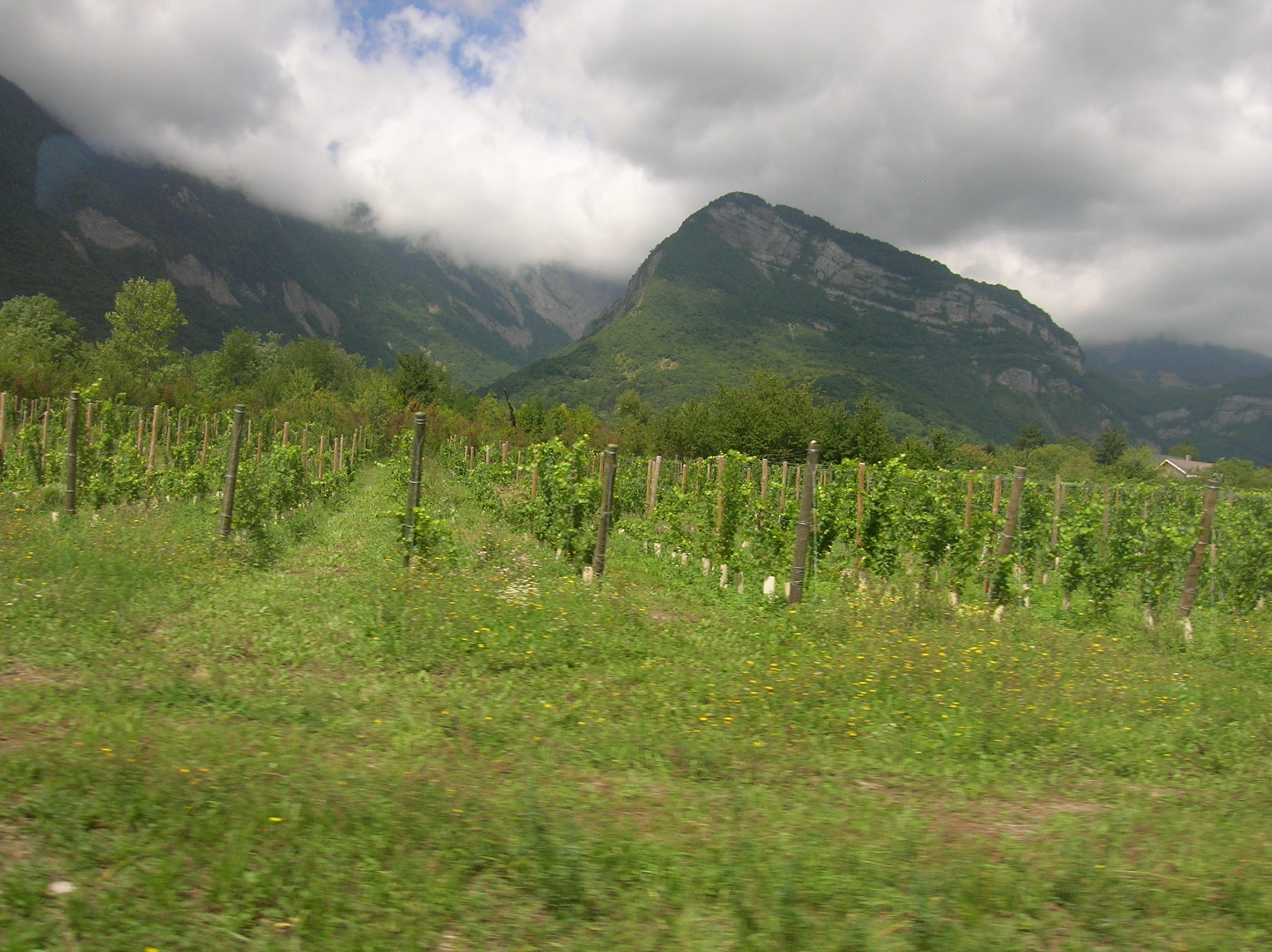 vignobles des Coteaux du Grésivaudan, pour la production du Coteaux-du-grésivaudan, Bernin, Isère, AuRA, France.